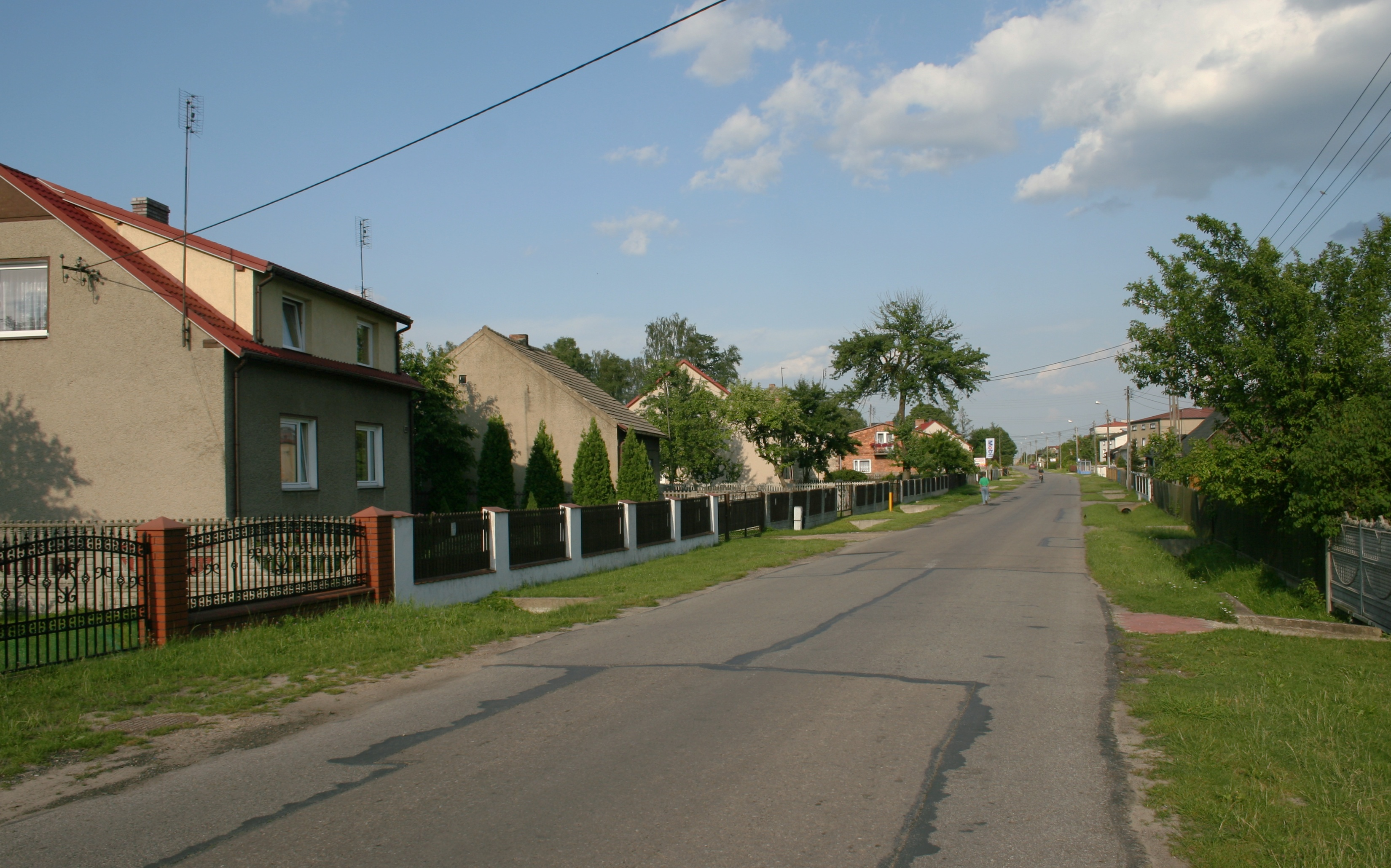 Starcza - fragment miejscowości.